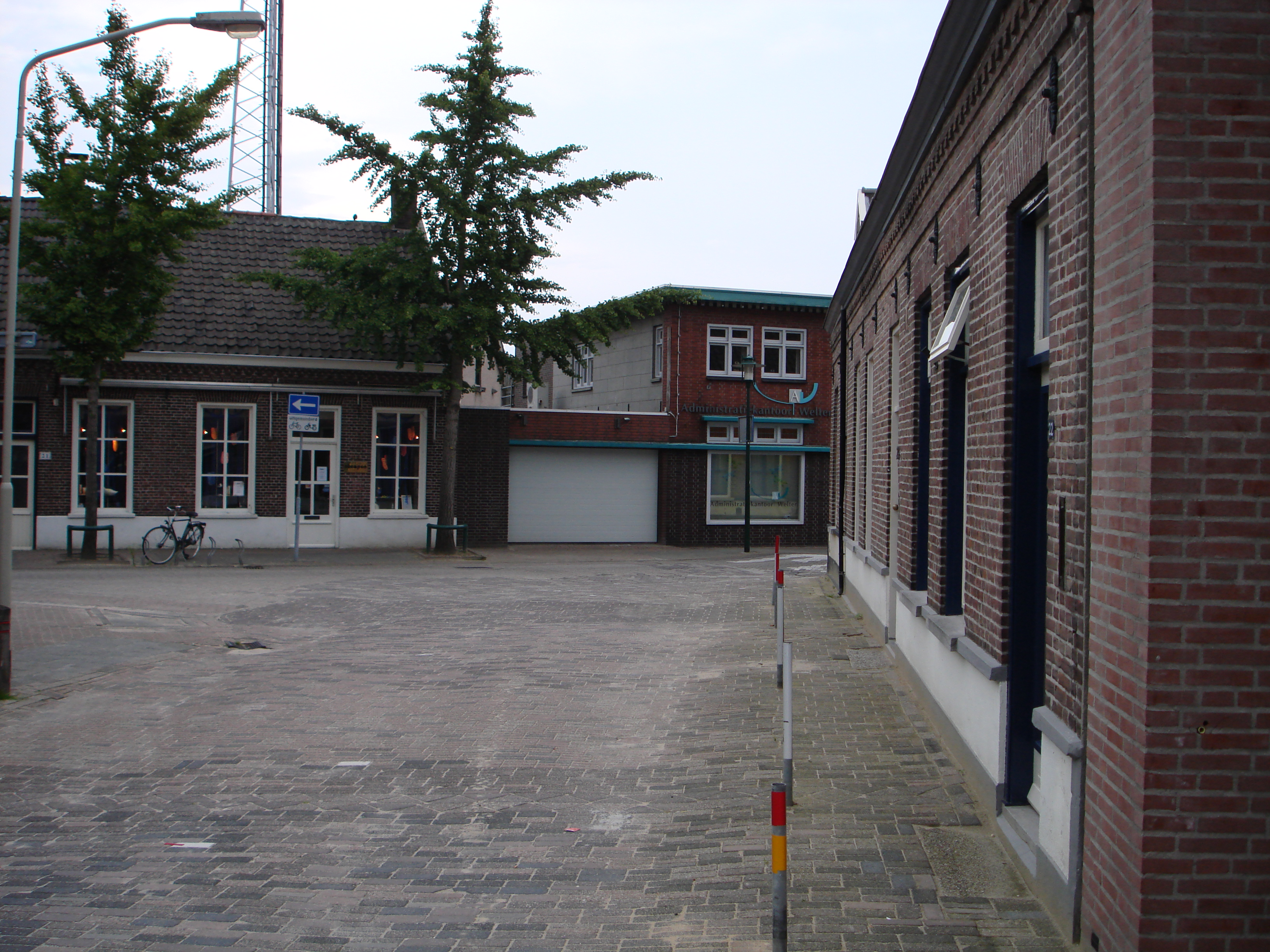 Blik vanuit Wever op Molenstraat